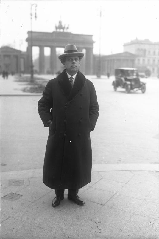 Prof. Max Reinhardt, künstlerischer Leiter der Staats-Theater! Prof. Max Reinhardt, der bekannte Theater-Regisseur wird noch in dieser Spielzeit mehrere Inzenierungen in der Oper Unter den Linden und im Schauspielhaus übernehmen.